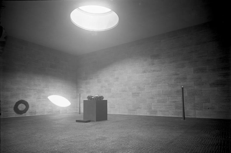 Die feierliche Einweihung des Preussischen Ehrenmals Unter den Linden in Berlin! Blick in das Preussische Ehrenmal Unter den Linden in Berlin zum Gedenken an die Toten des Weltkrieges 1914 bis 1918.